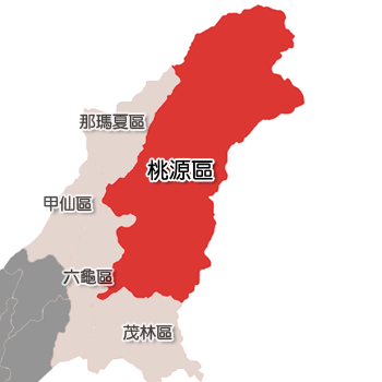 桃源區相對位置